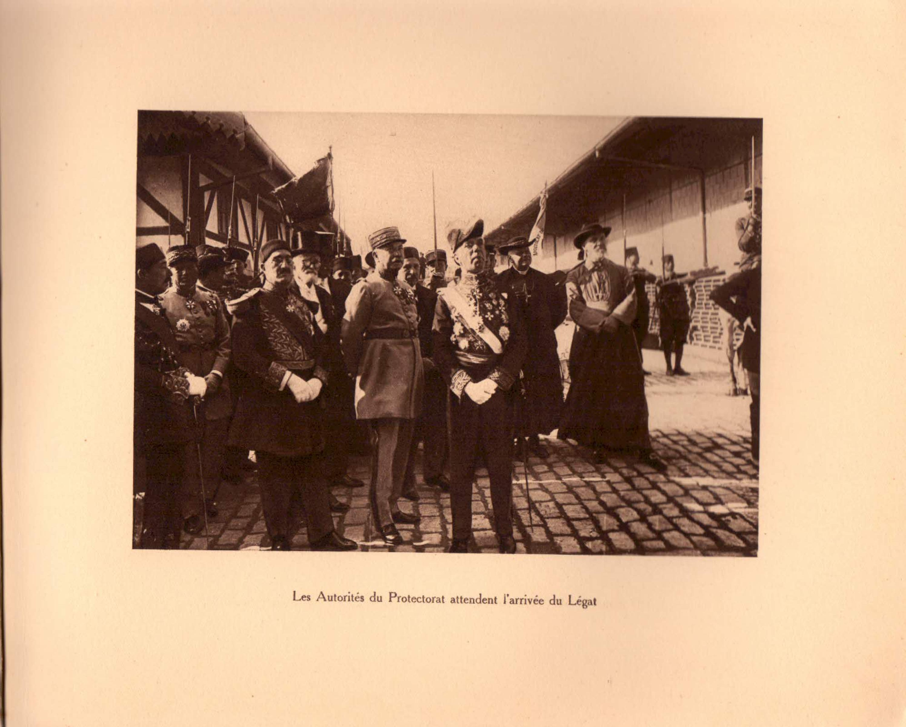 Les autorités du Protectorat attendent l'arrivé du Légat